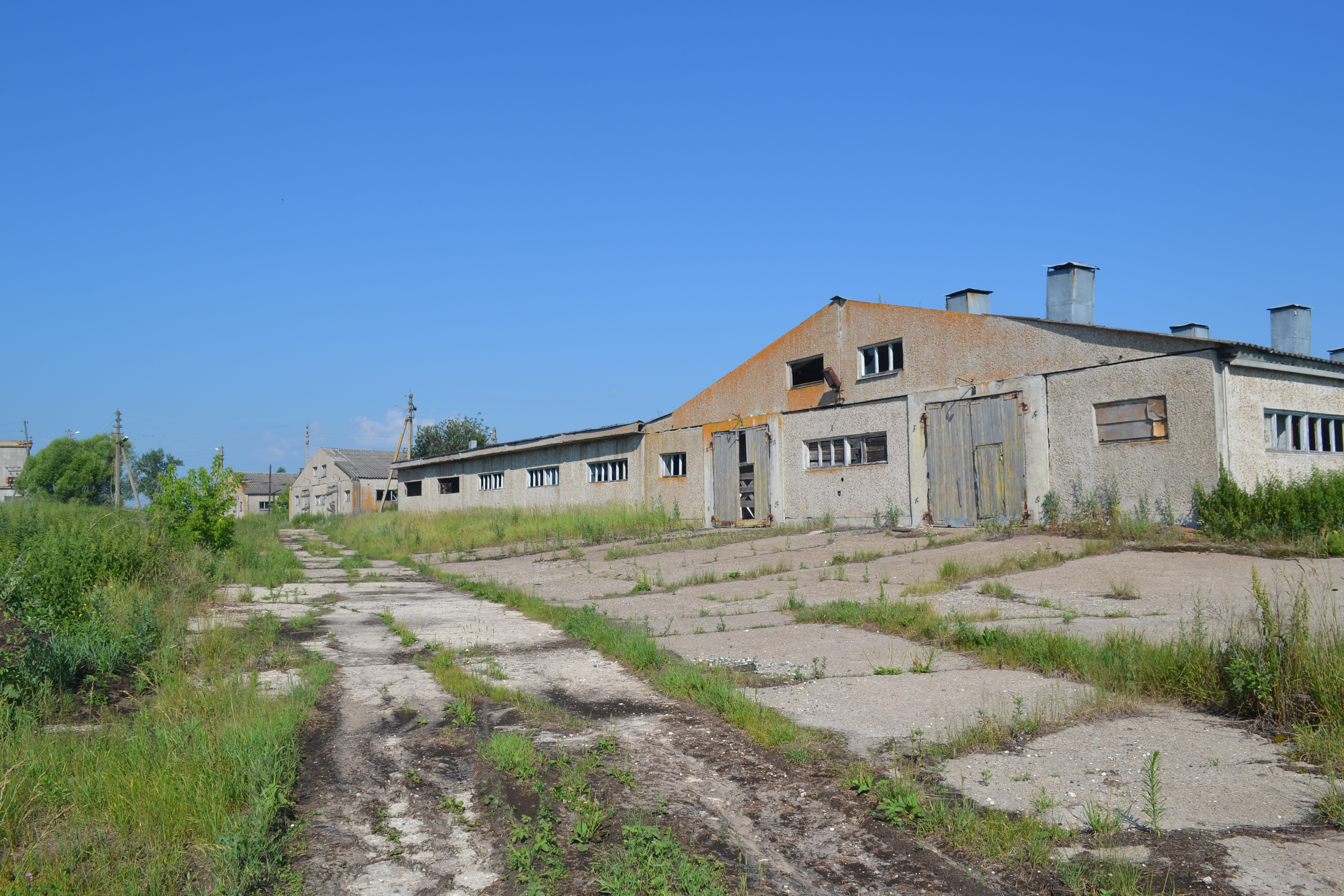 Заброшенные колхозные здания в Воропино